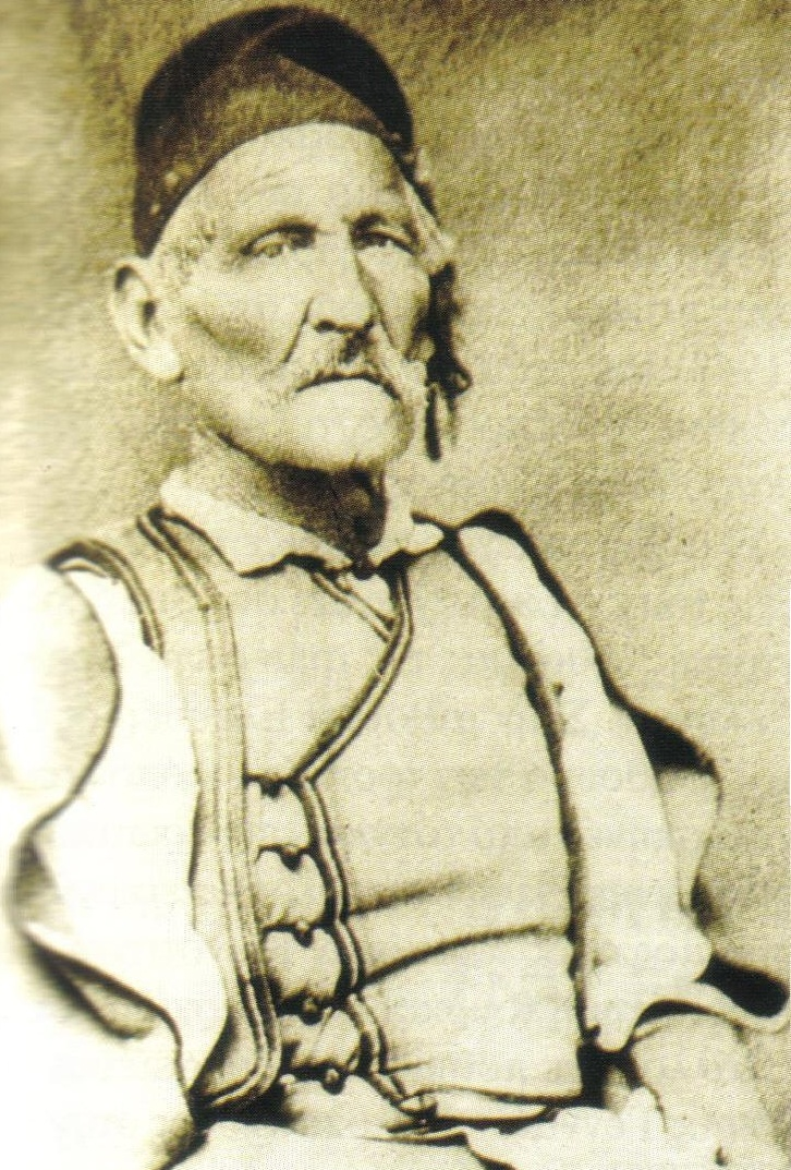 Ο Ιωάννης Θεοφιλόπουλος (1790-1885), φωτογραφημένος σε προχωρημένη ηλικία.